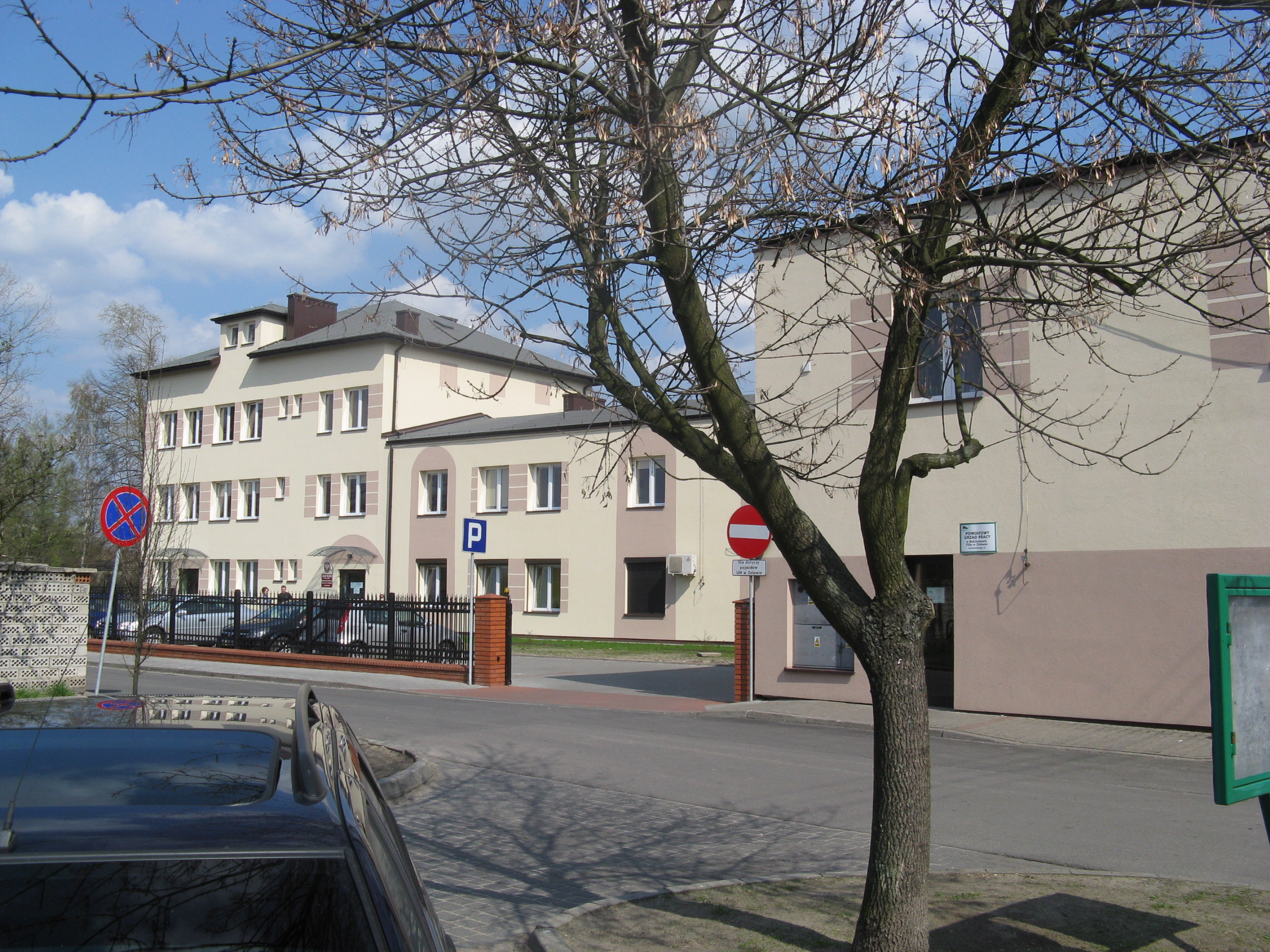 Nowy budynek Urzędu Gminy Zelów